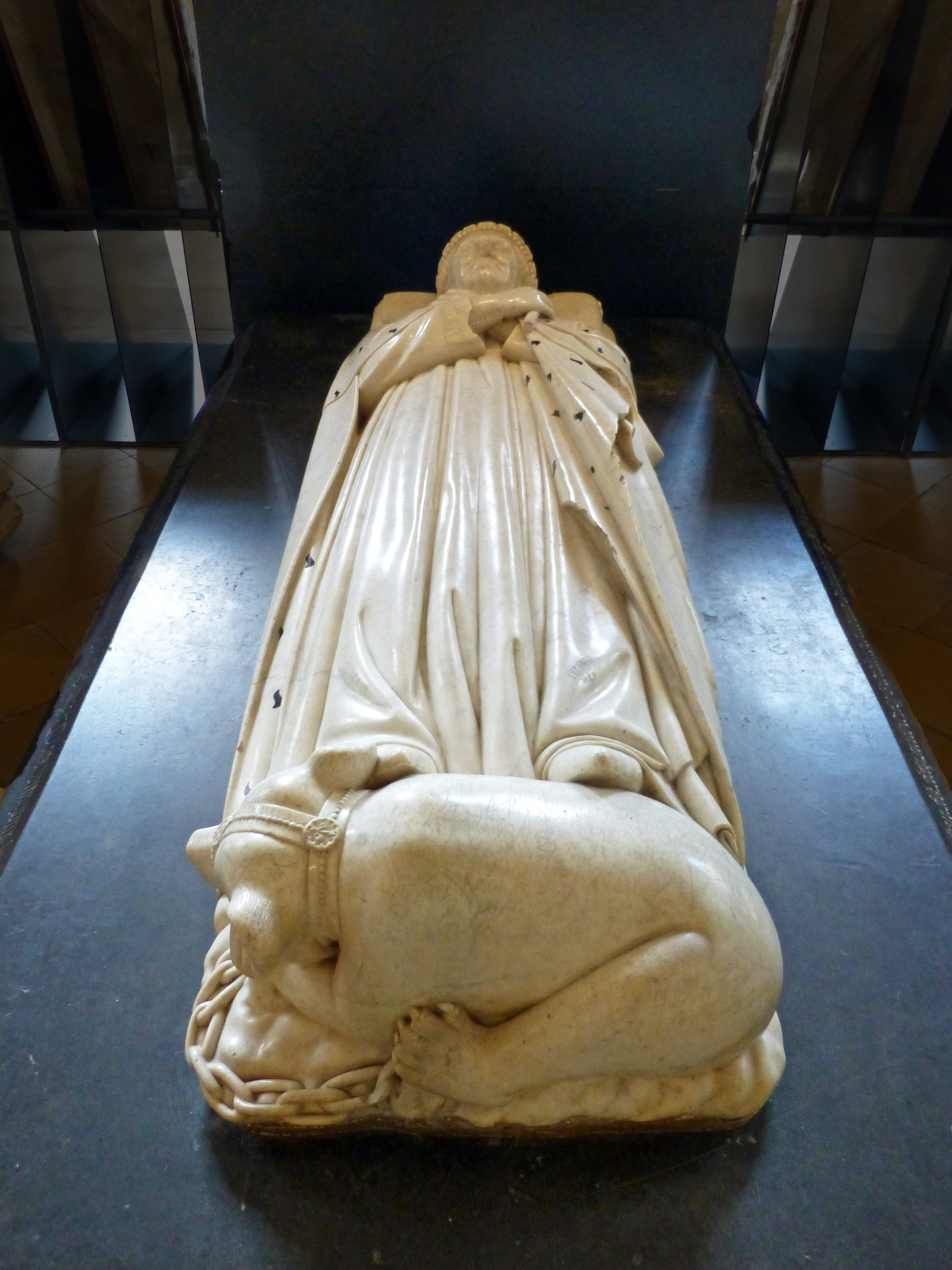 Tombeau du duc Jean de Berry dans la crypte de la cathédrale de Bourges